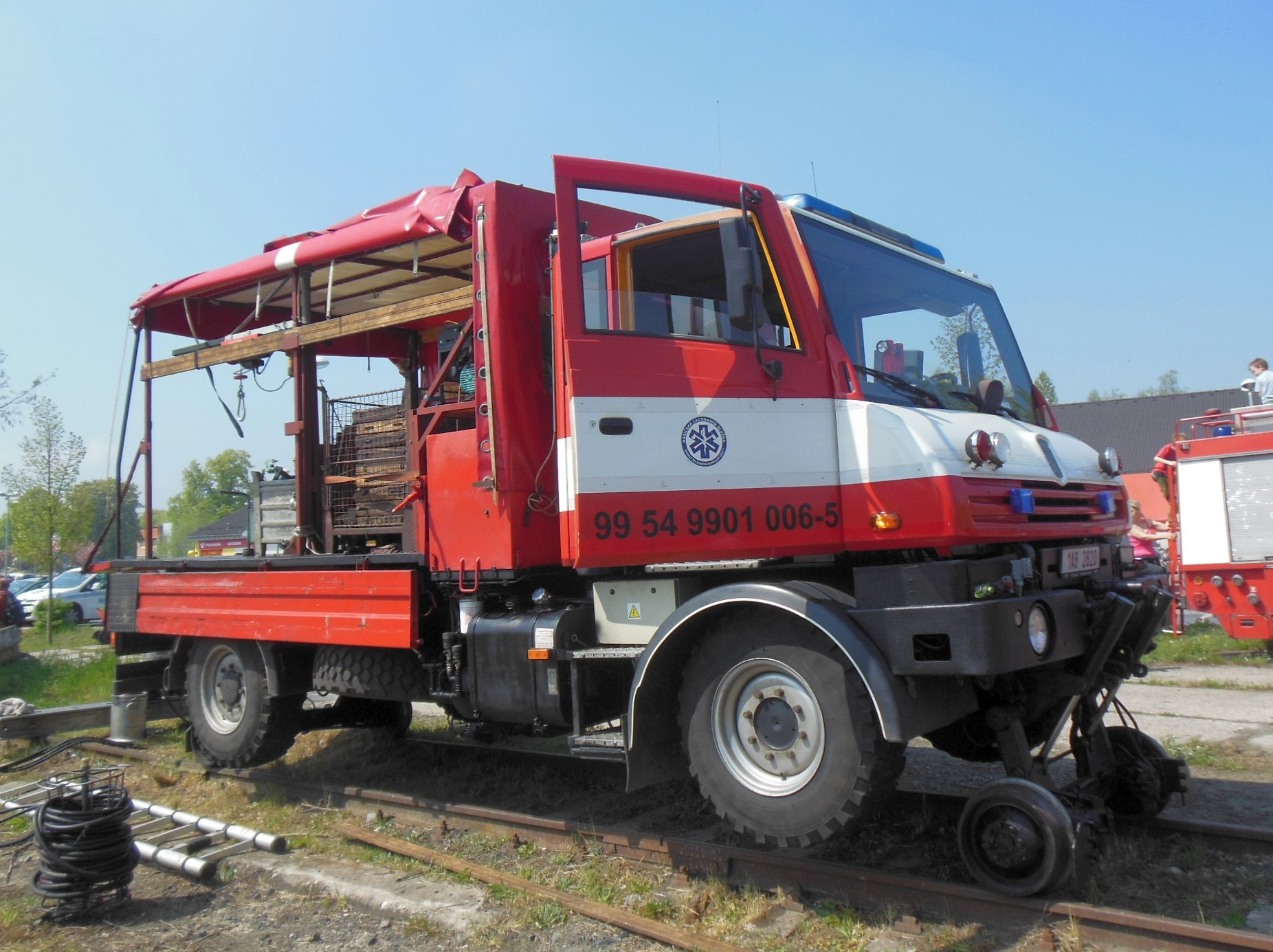 1. regionální den PID - 50 let "pantografů". Praga Alfa TN Hasičské záchranné služby SŽDC u Penny Marketu v ulici Armádní v Milovicích (okres Nymburk).